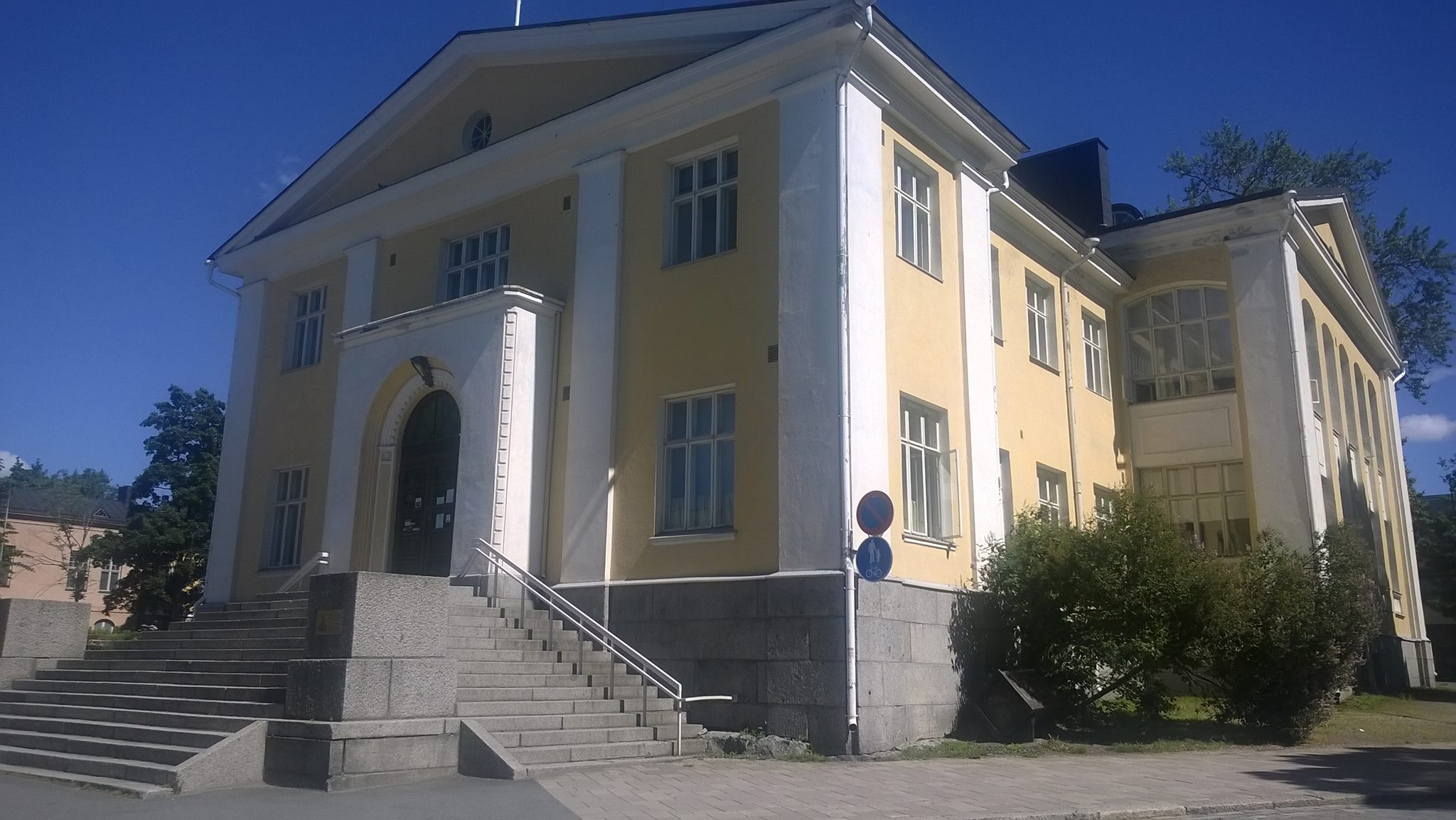 Kumppanuustalomme jossa A-Kilta sijaitsee.